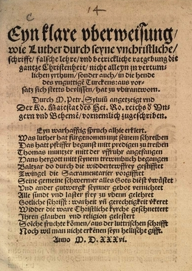 Titelseite der Schrift von Petrus Sylvius Eyn klare uberweisung wie Luther durch seyne unchristliche schrifft... (1536)